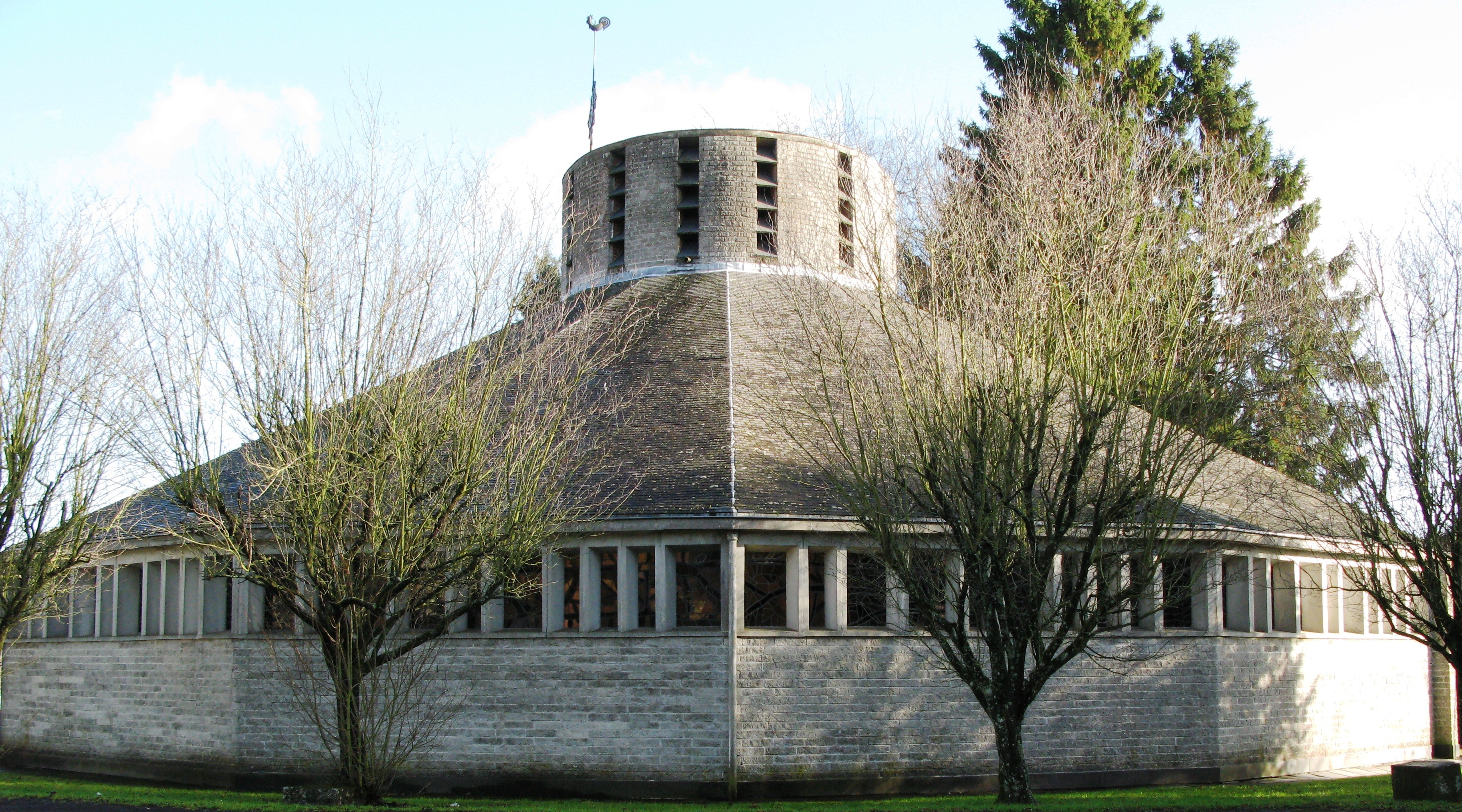 Kierch vun Noutem am Arelerland.